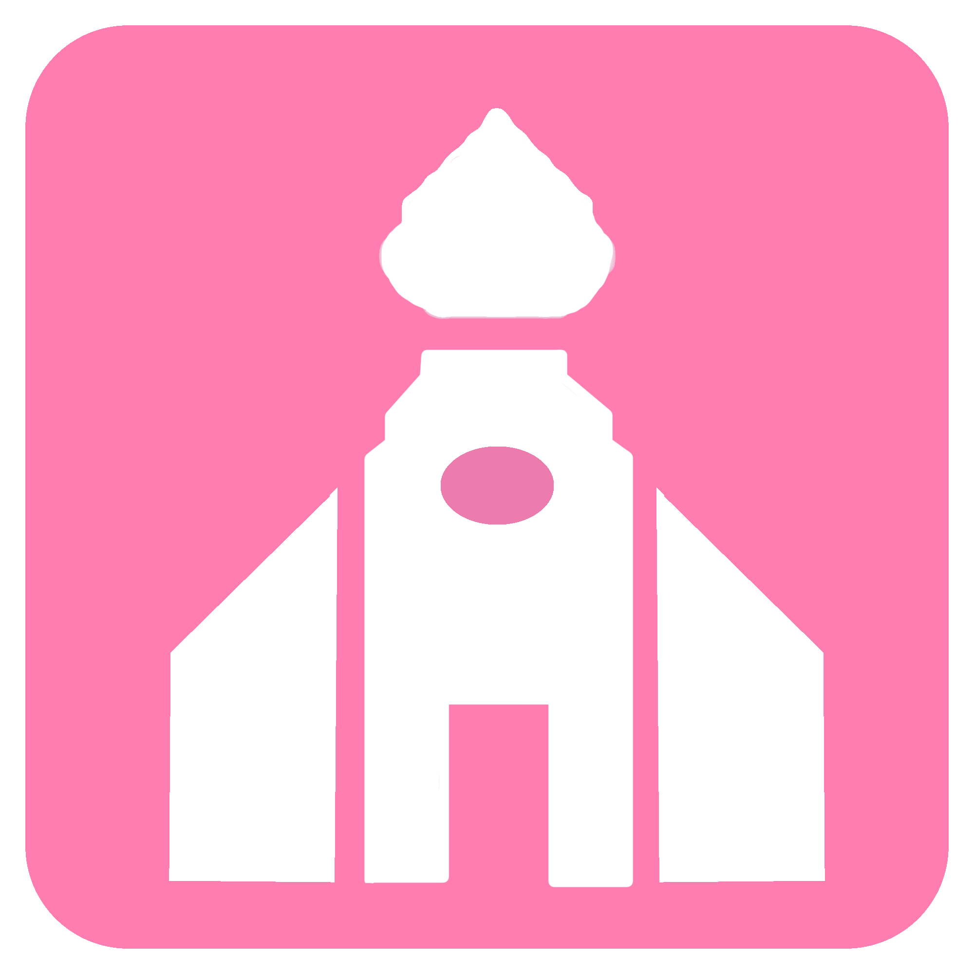 Símbolo utilizado para identificar a la estación Pelequén en 2001.